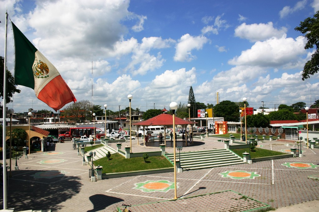 Parque Benito Juarez en Alamo Temapache Ver.